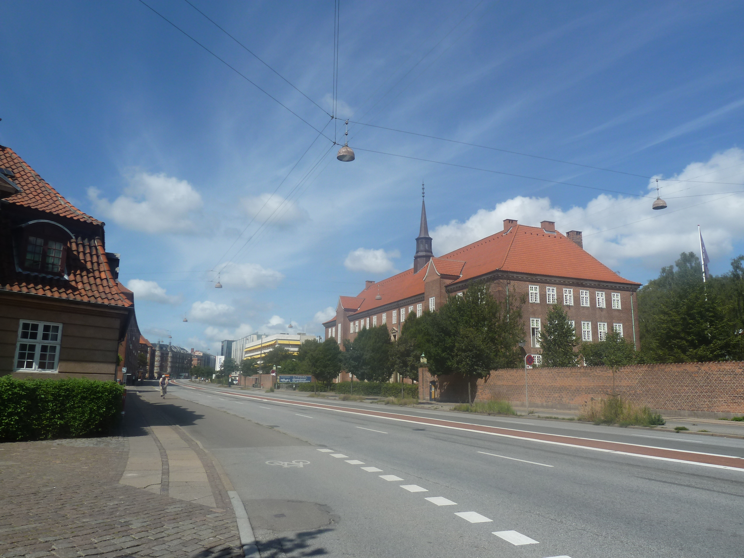 The street Tagensvej in Nørrebro in Copenhagen.